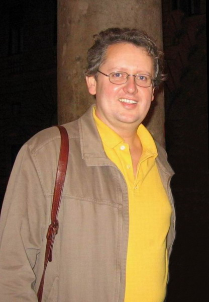 Kovácsházi István operaénekes